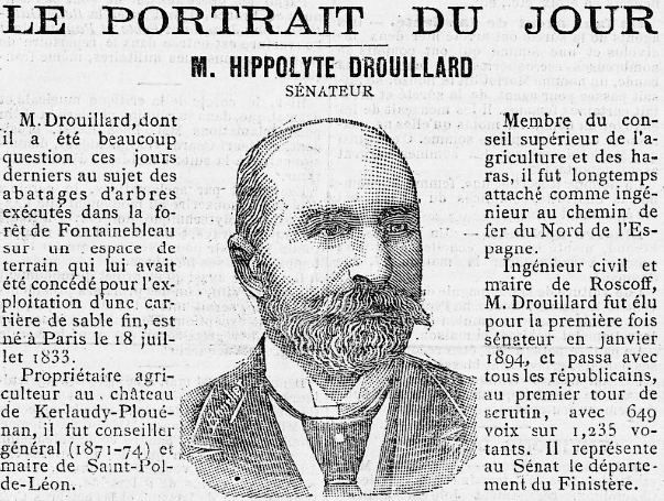 Portrait de Pierre Marie Hippolyte Drouillard, dit Hippolyte Drouillard de La Marre (1833-1895), qui fut maire de Saint-Pol-de-Léon, puis de Roscoff, conseiller général, sénateur en 1894 et qui habitait le château de Kerlaudy en Plouénan.